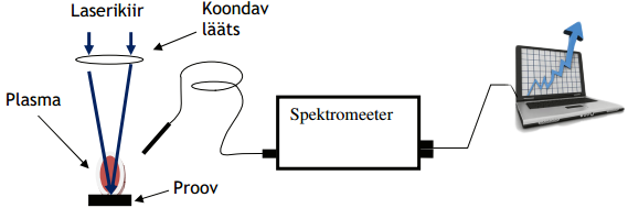 LIBS katseseadme põhimõtteline skeem